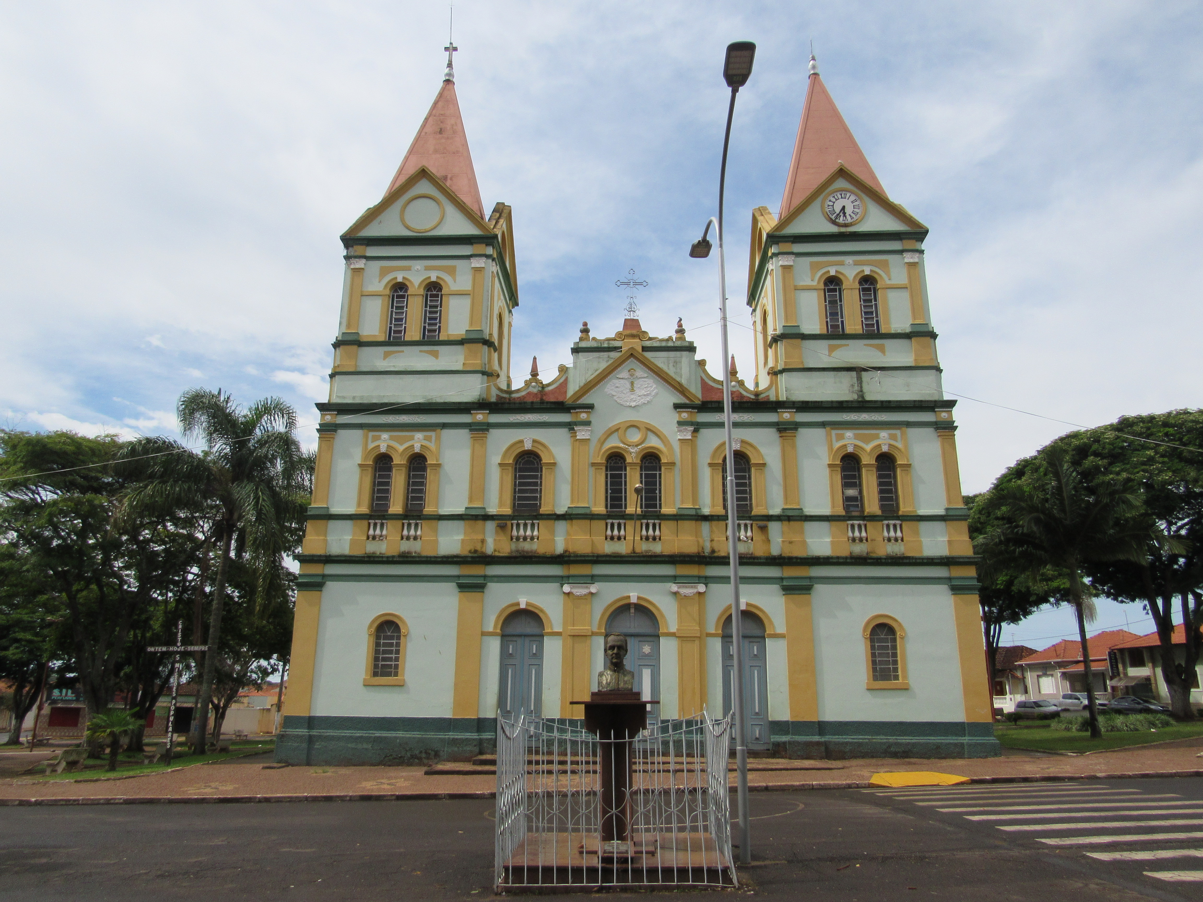 Igreja Matriz Nossa Senhora das Dores, Ibiraci (MG), Brasil (12-01-2019)